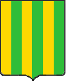 Blason de la famille Trivulzio